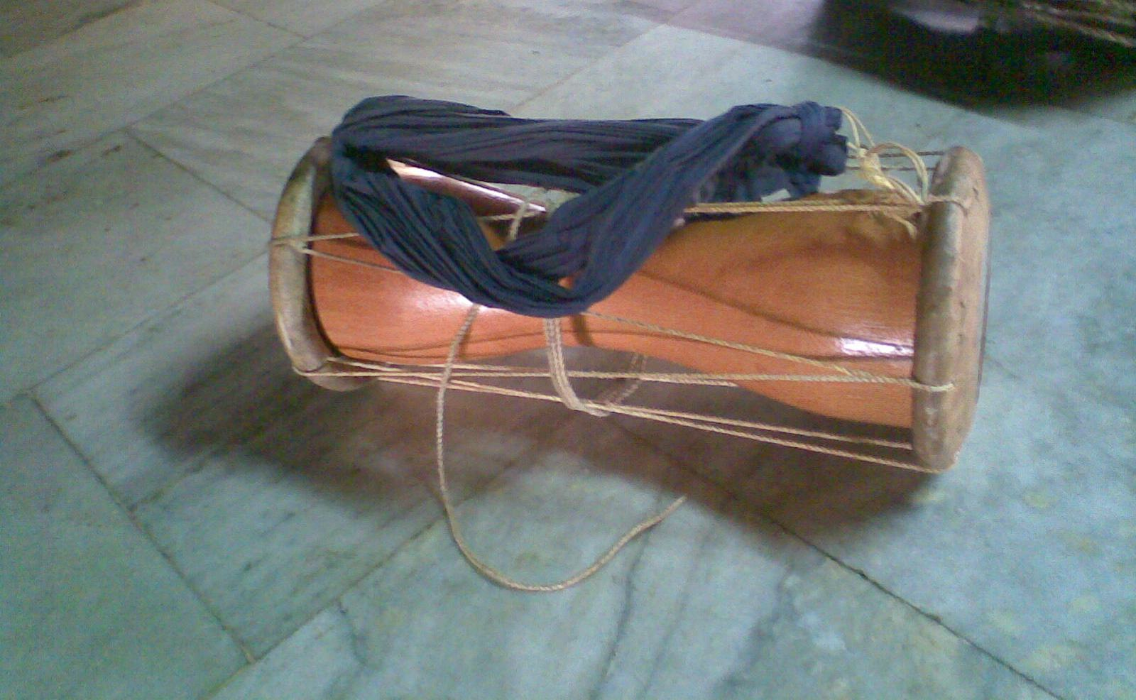 തിമിലയുടെ ചിത്രം